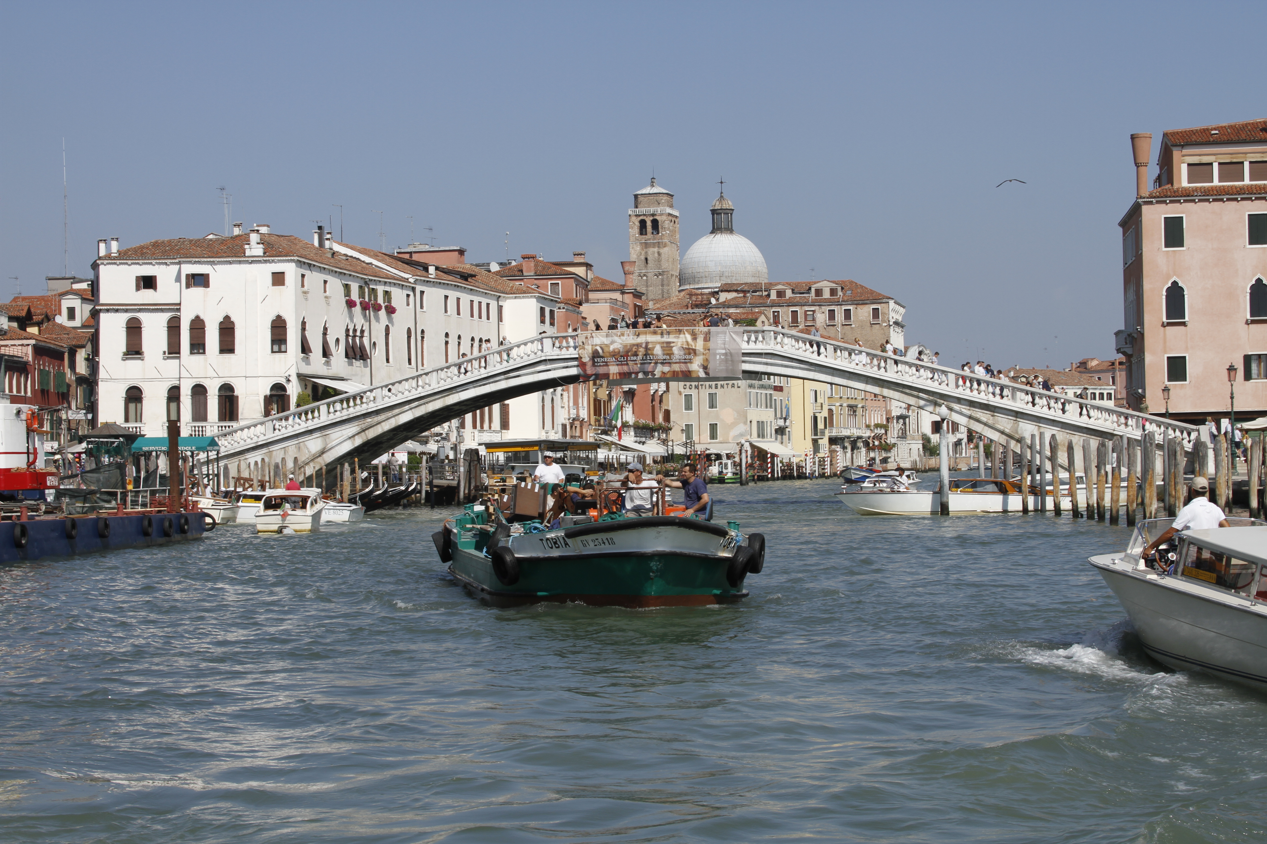 Ponte degli Scalzi